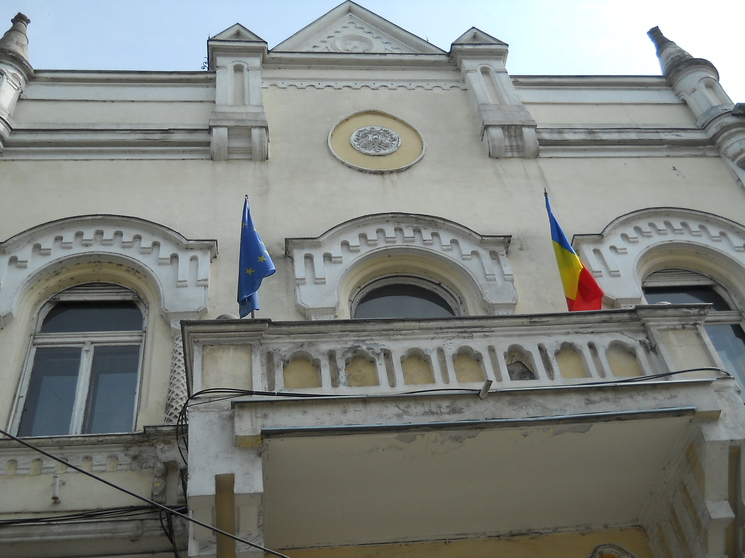 Fațada Palatului Copiilor